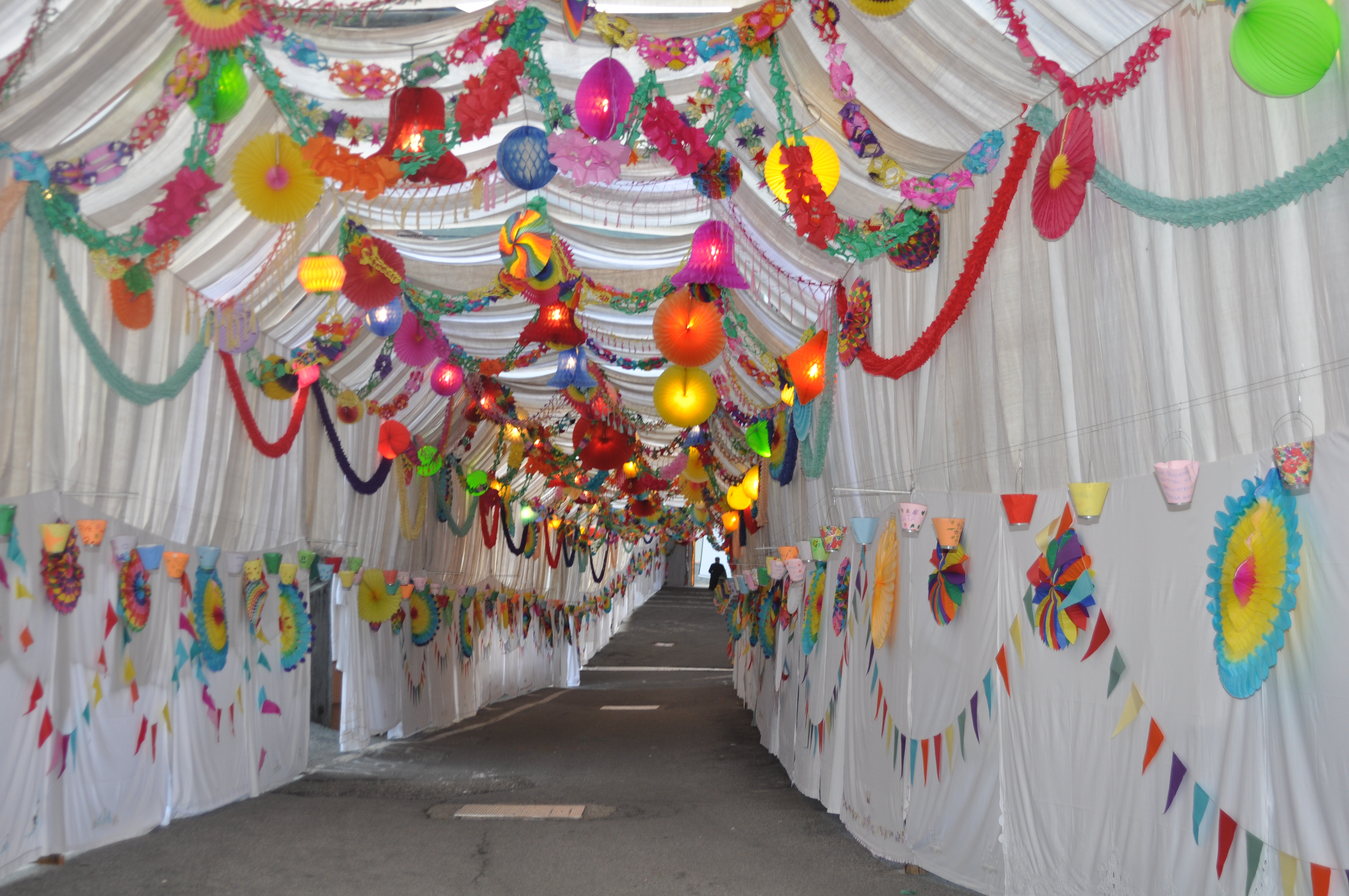 luzzogno